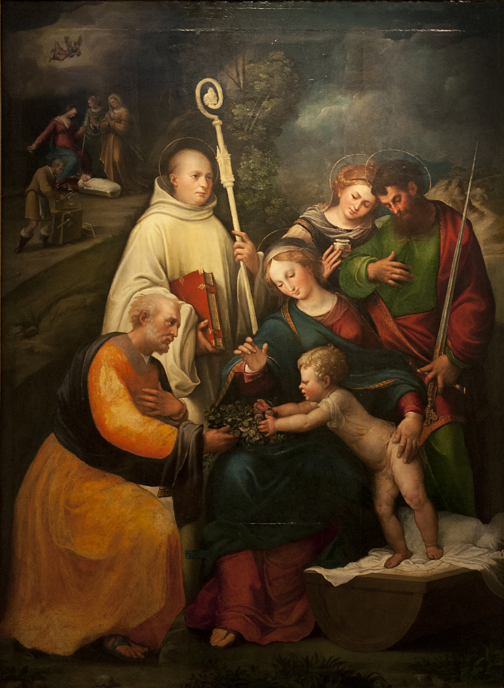 De Heilige Familie met Benedictus, Paulus en Maria Magdalenalabel QS:Lnl,"De Heilige Familie met Benedictus, Paulus en Maria Magdalena"